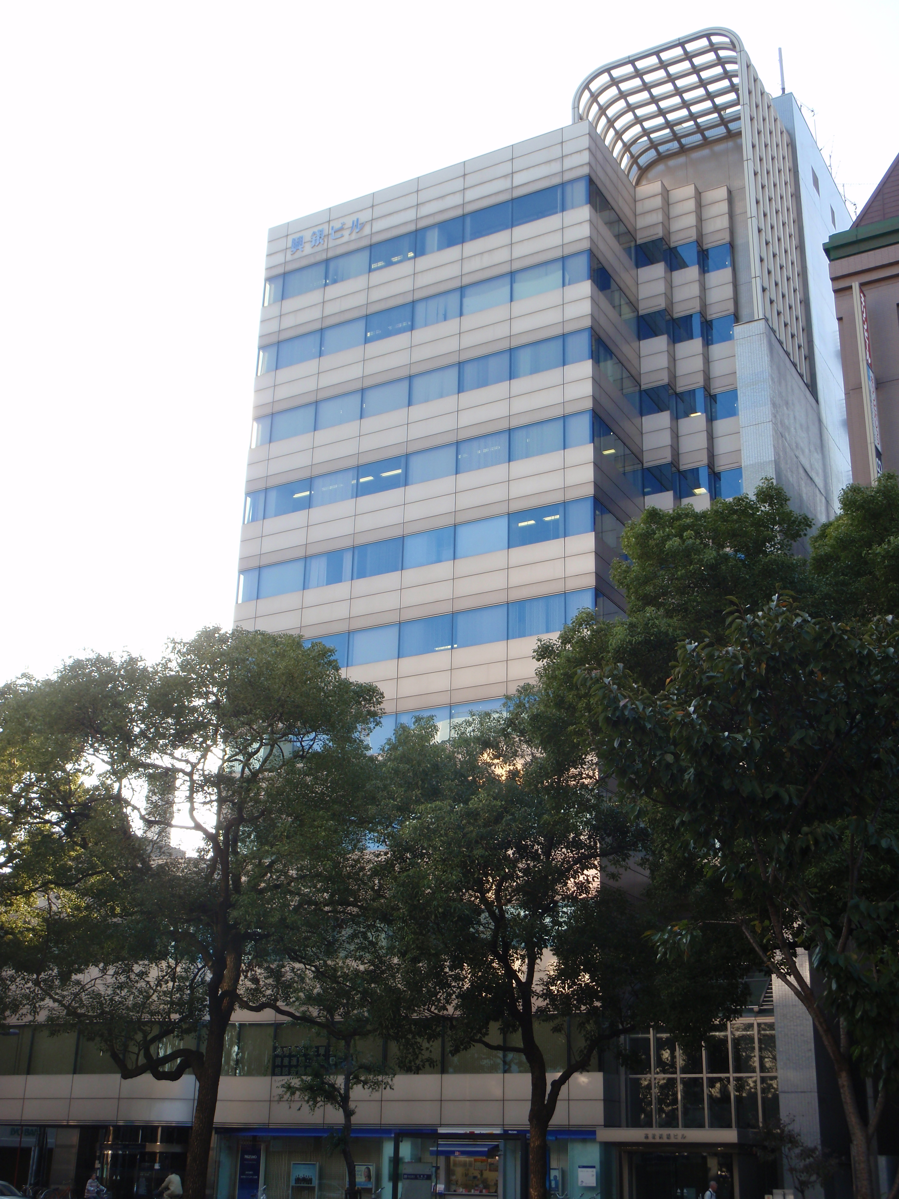 香川県高松市番町一丁目にある高松興銀ビル。ケーブルメディア四国（高松ケーブルテレビ）などが入居する。